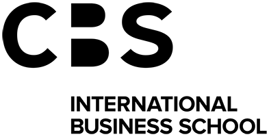 CBS International Business School